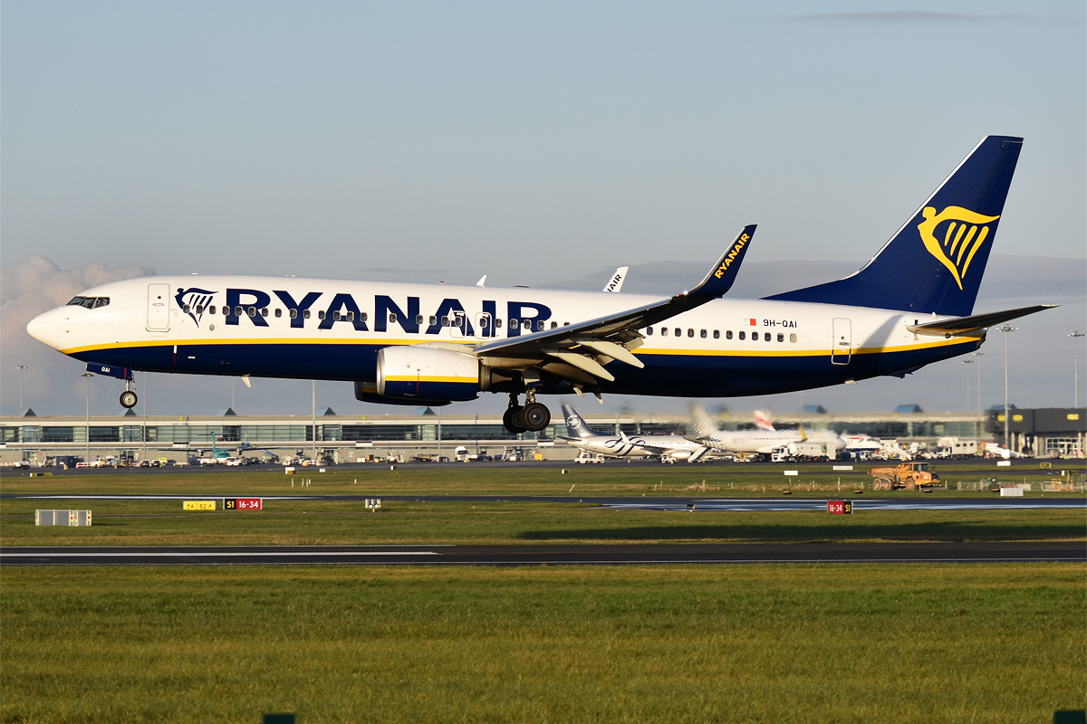 Ryanair, 9H-QAI, Boeing 737-8AS